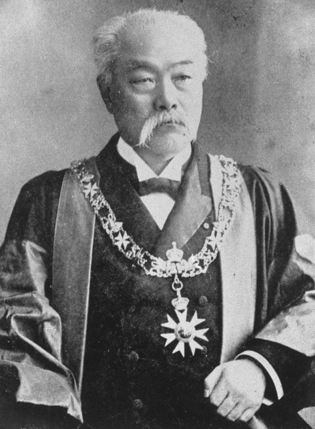 Portrait of Matsukata Masayoshi (松方正義, 1835 – 1924)